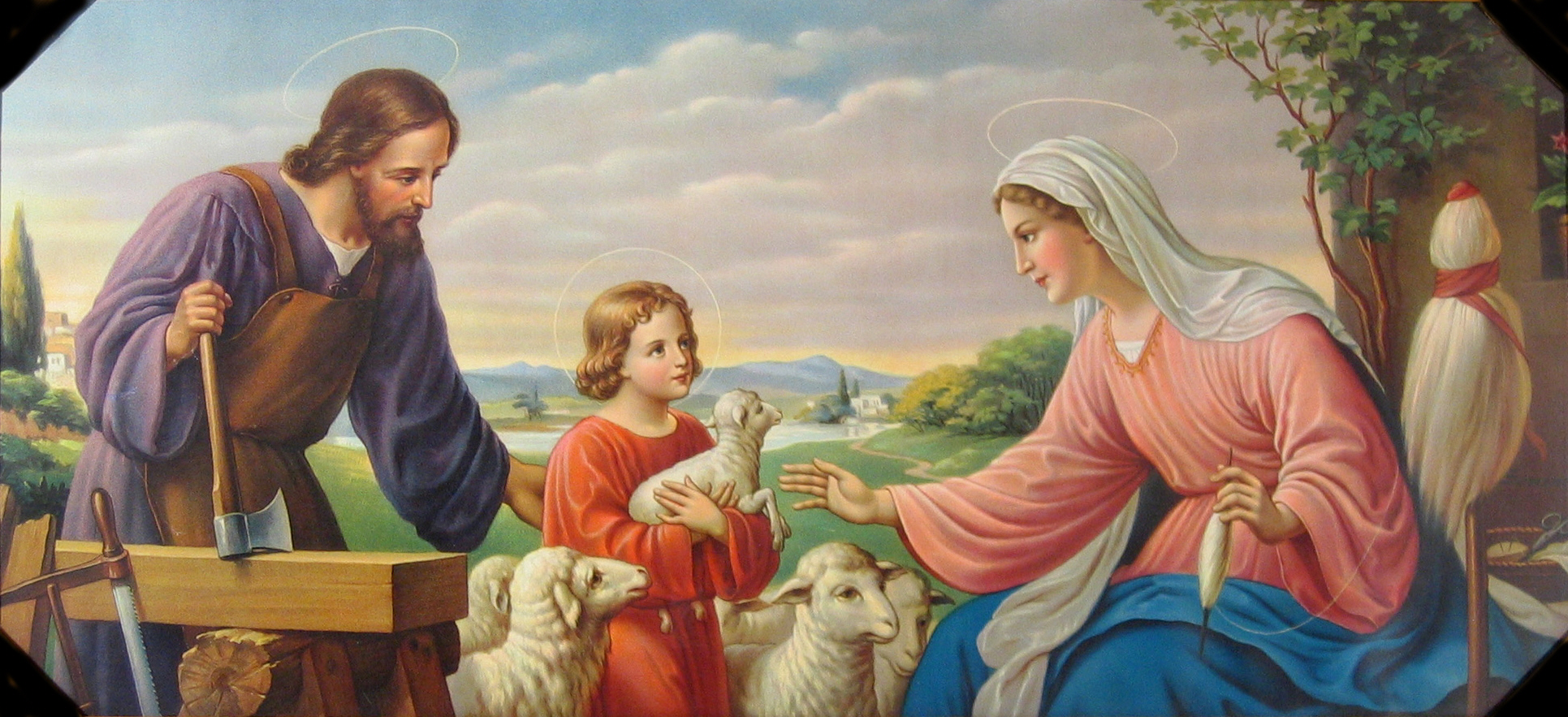 Heilige Familie (Haus Nazareth), Chromolithographie um 1930